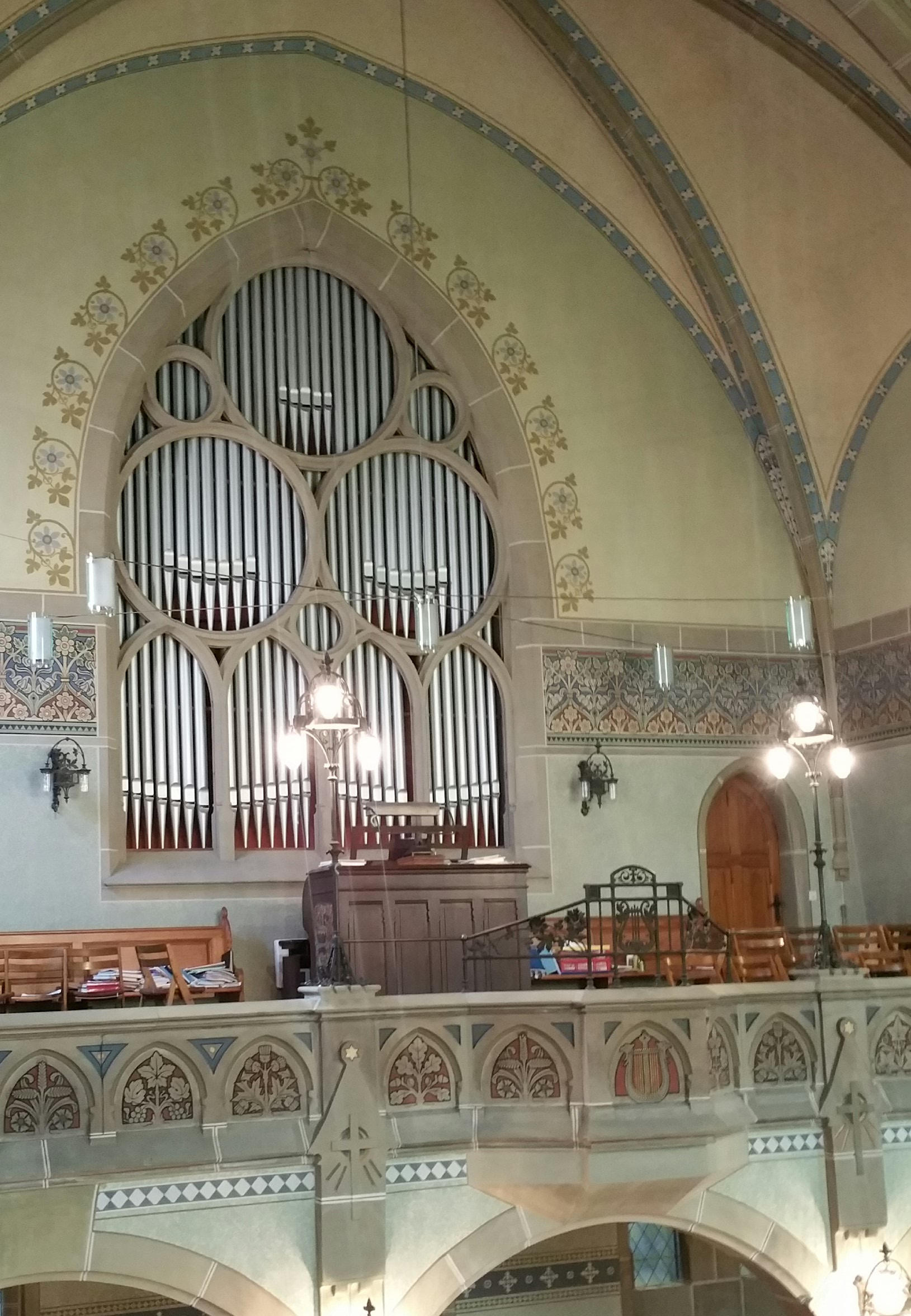 Dortmund Asseln ev Kirche, Ansicht der Süd/Sängerempore mit Orgel